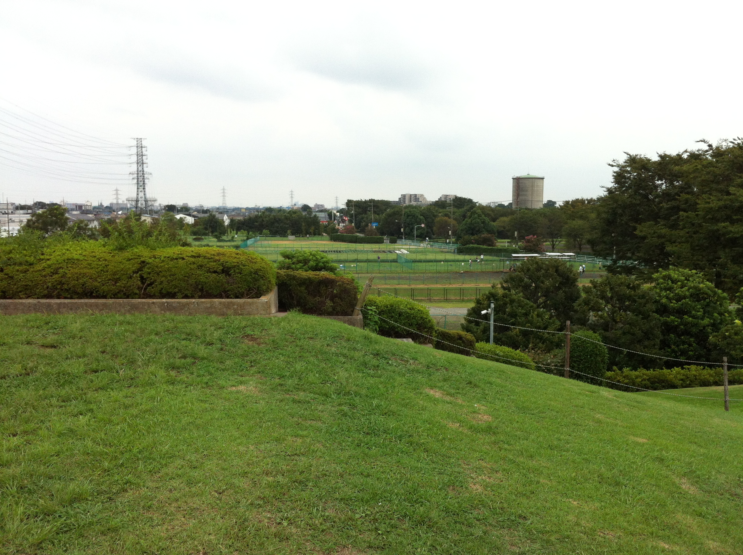 2 Chome-1 Jindaiji Kitamachi, Chōfu-shi, Tōkyō-to 182-0011, Japan